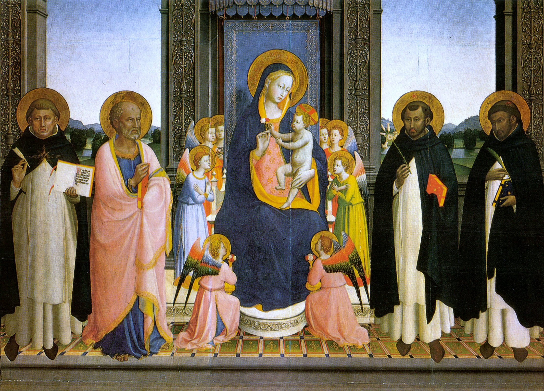 Beato angelico, pala fiesole, 1424-1425